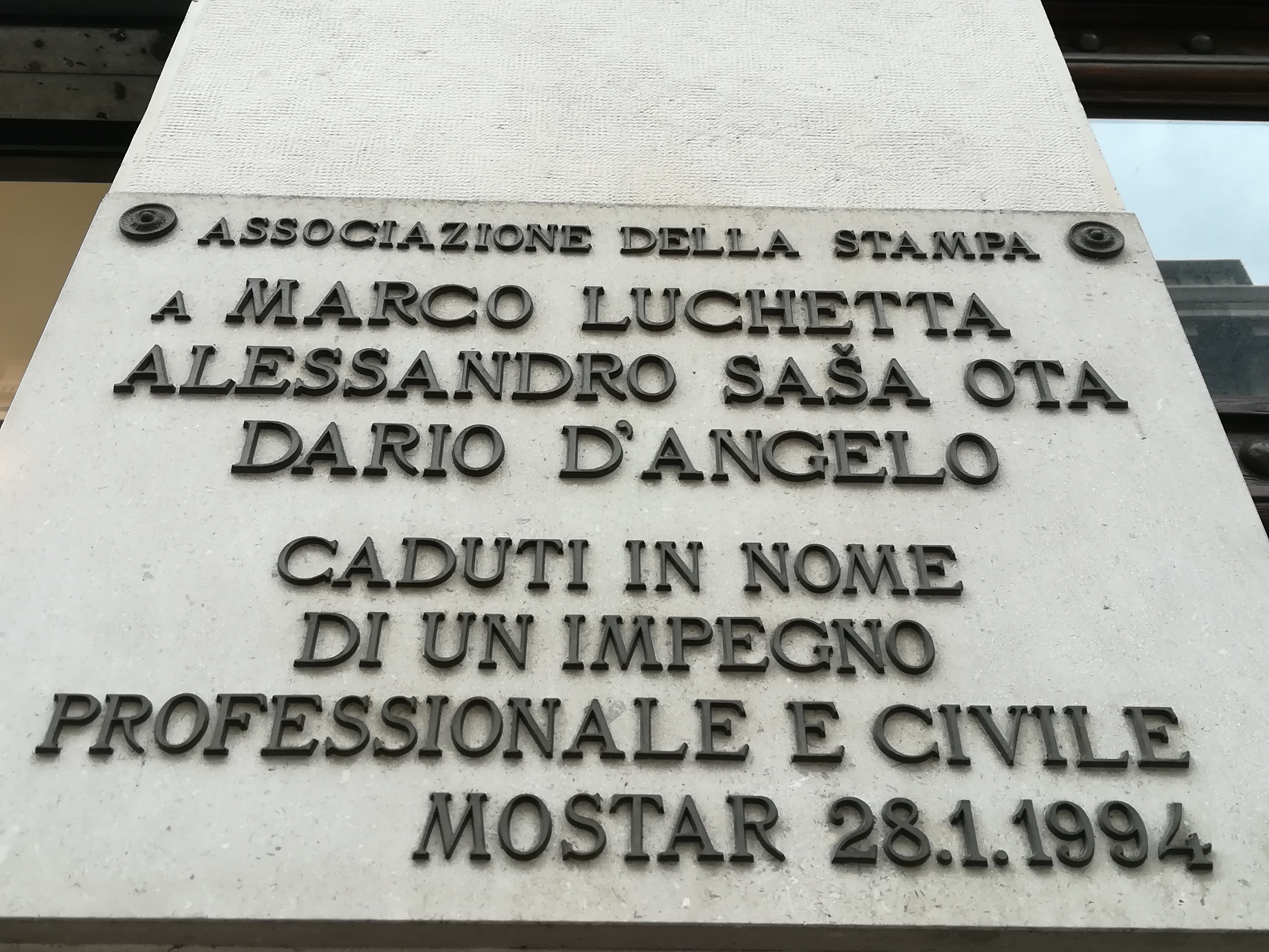 Targa commemorativa a Trieste: "Associazione della stampa a Marco Luchetta Alessandro Saša Ota Dario d'Angelo Caduti in nome di un impegno professionale e civile Mostar 28.1.1994"